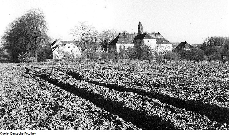 Original image description from the Deutsche FotothekPuschnitz-Jeßnitz. Ehem. Rittergut